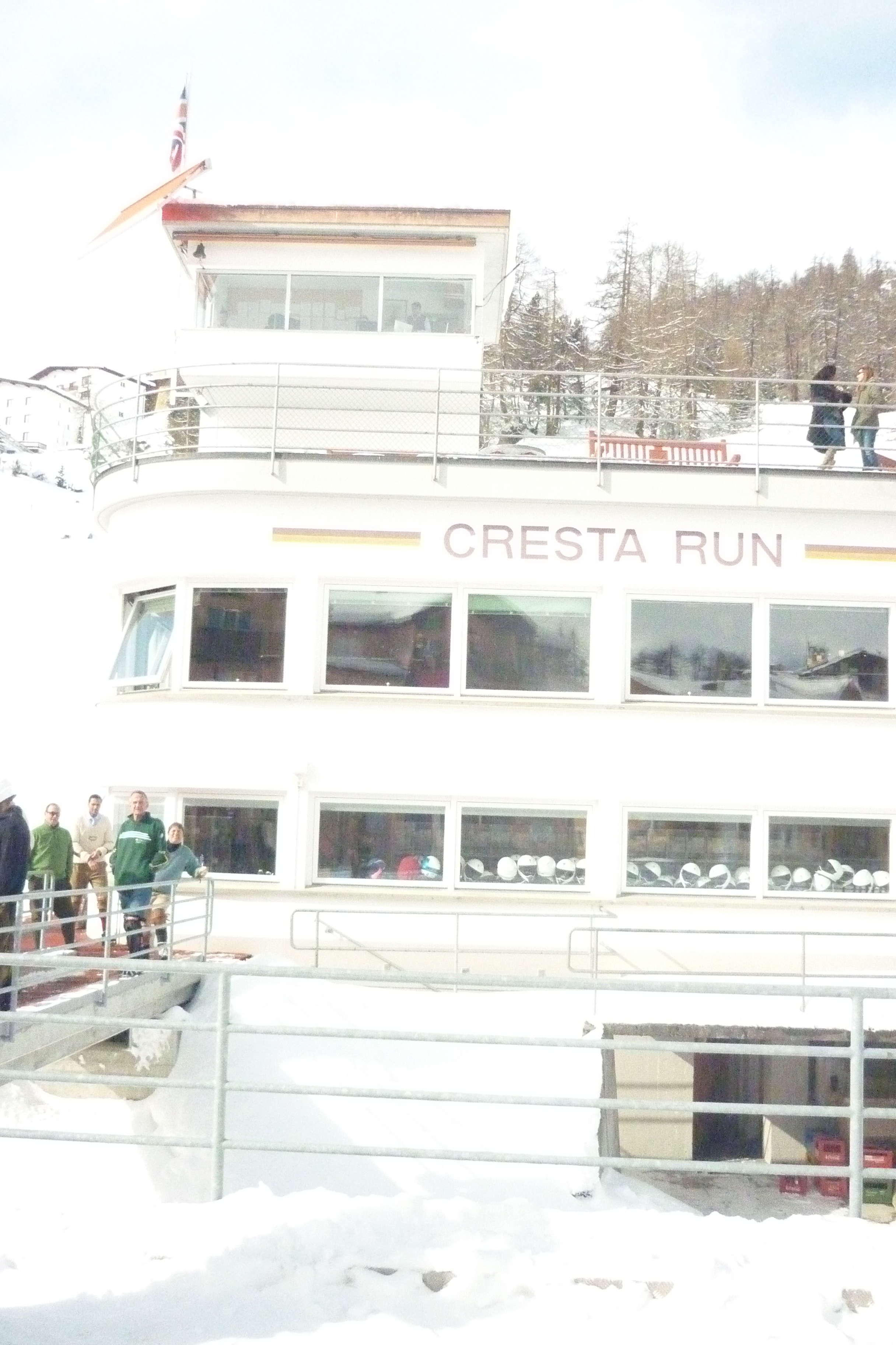 Cresta Run Clubhuis